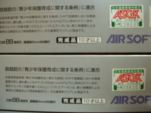 銃砲刀剣類所持等取締法の改正以前に使用されていたASGKの適合シール 赤字の「ASGK」シールは固定スライドガスガンや競技専用エアガンに当てはまらないエアソフトガンに貼られていた なお、一部の改修対象製品を除いては、旧シールでも改正銃刀法に適合しているため問題はない